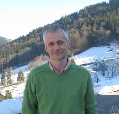 Foto di Otmar Scherzer